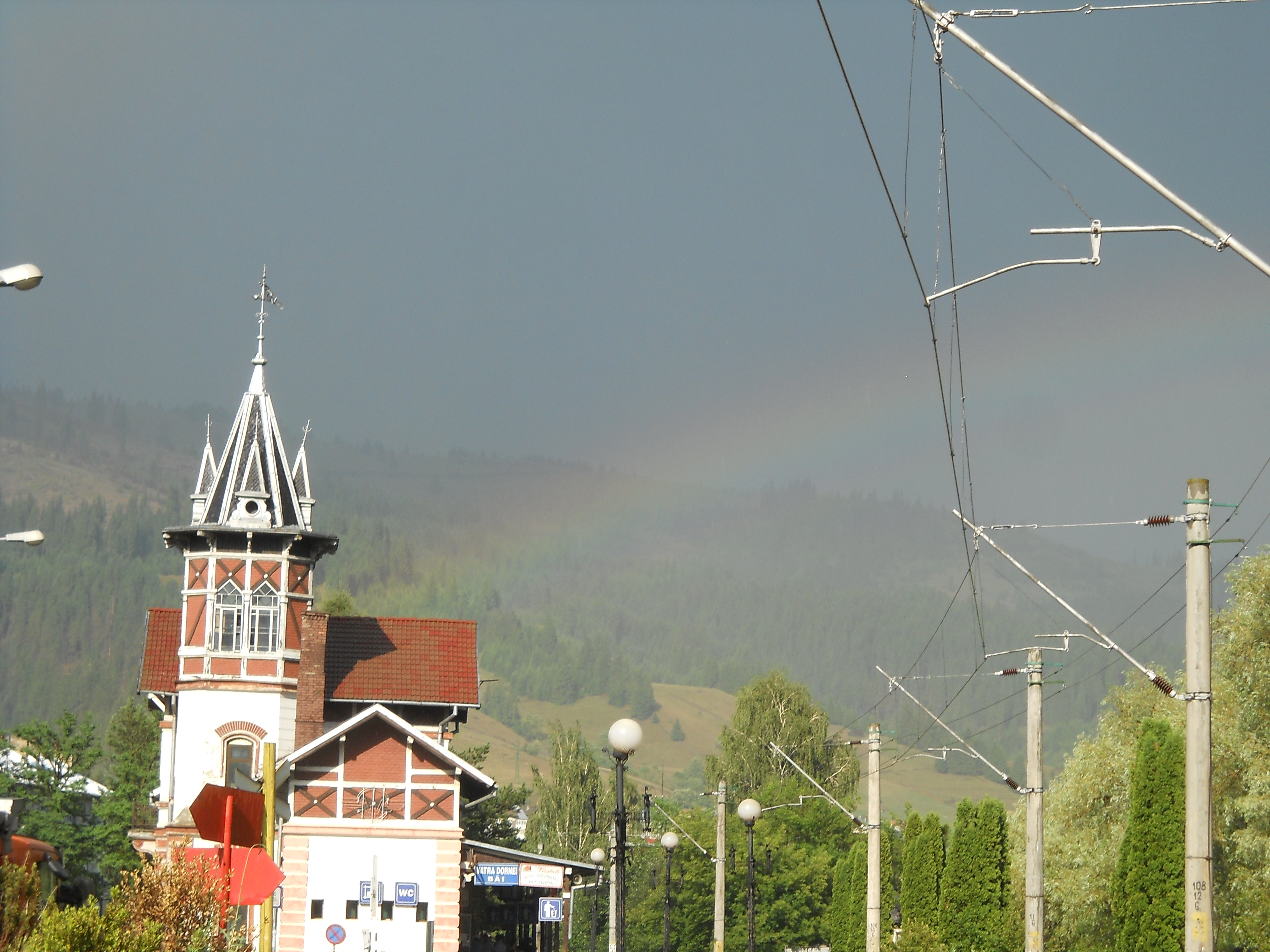 Gara Vatra Dornei Băi şi curcubeu.